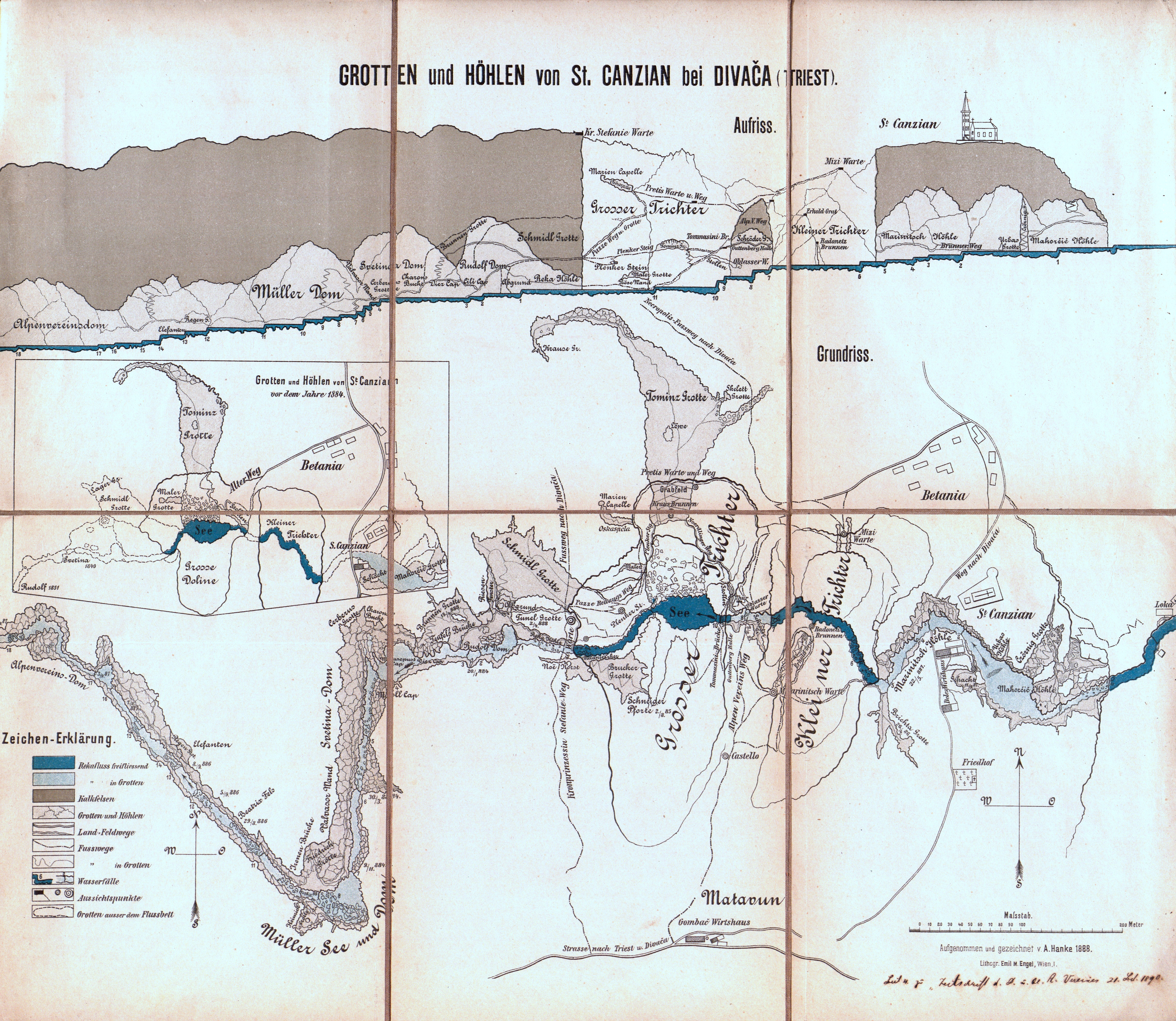 Grotten und Höhlen von St. Canzian bei Divača (Triest) aus Zeitschrift des Deutschen und Oesterreichischen Alpenvereins 1890 Band 21